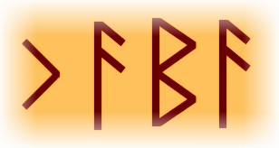 Runeninschrift kaba (Kamm) auf dem (Kamm von Frienstedt), westgermanisch